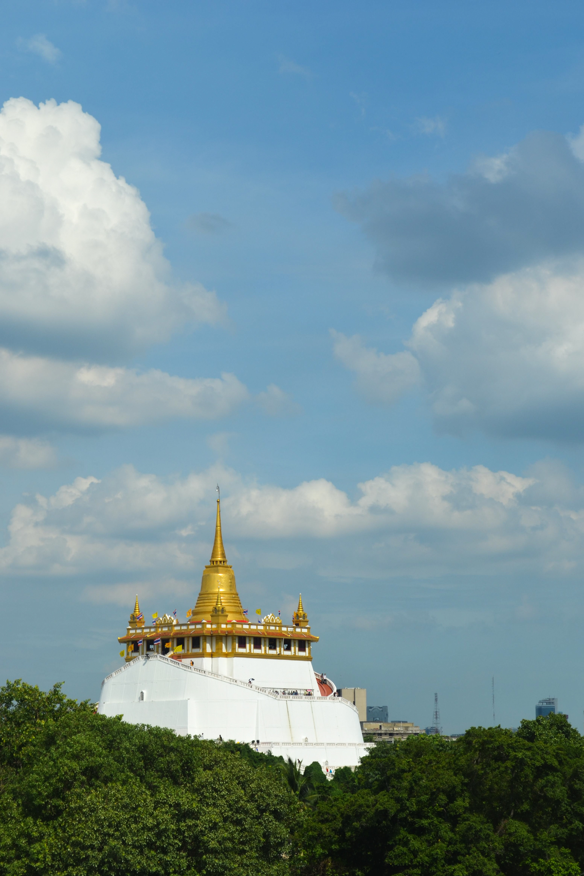 วัดสระเกศ